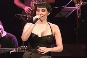 Cantora brasileira Mariana Baltar em imagem do acervo da TV Brasil.